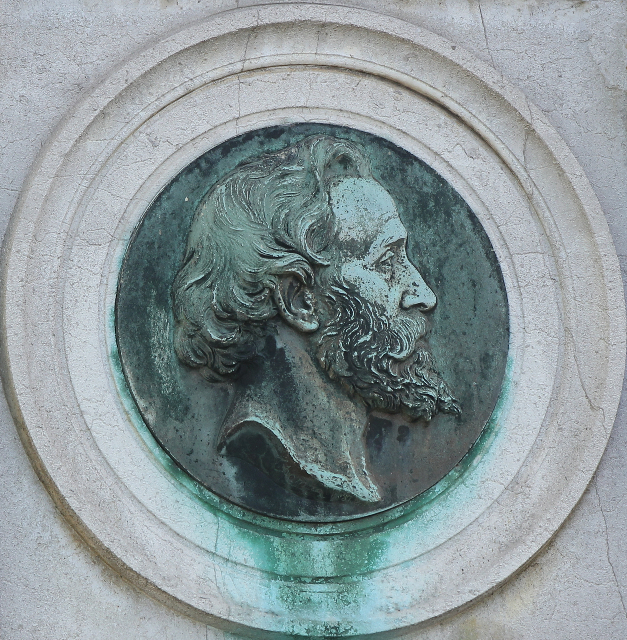 Médaillon